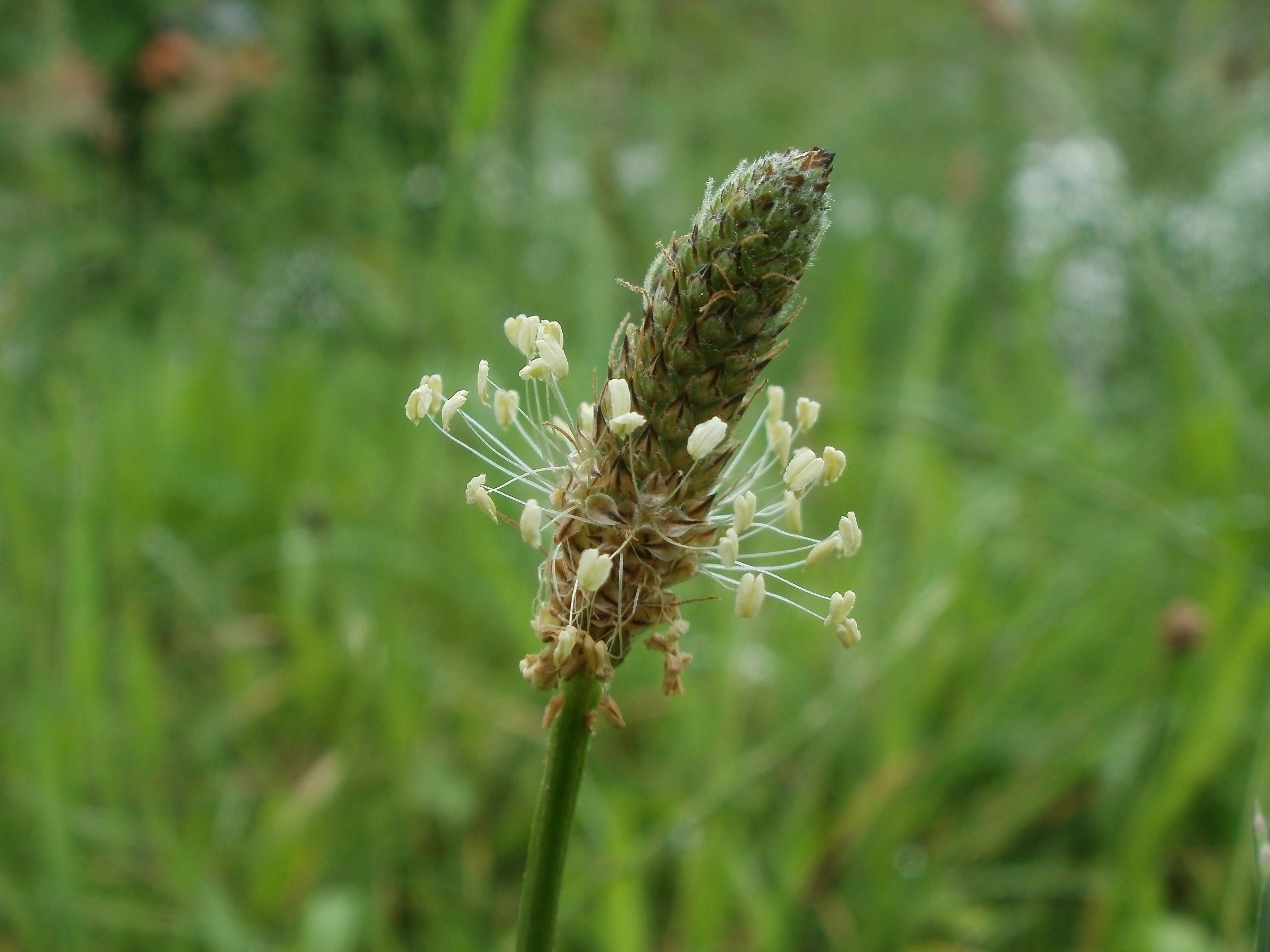 Spitzwegerich (Plantago lanceolata) am Staden (Saarbrücken)